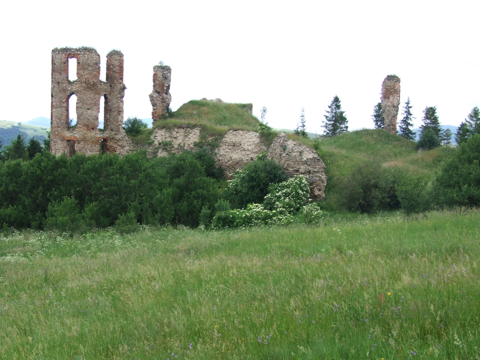 Plaveč Castle